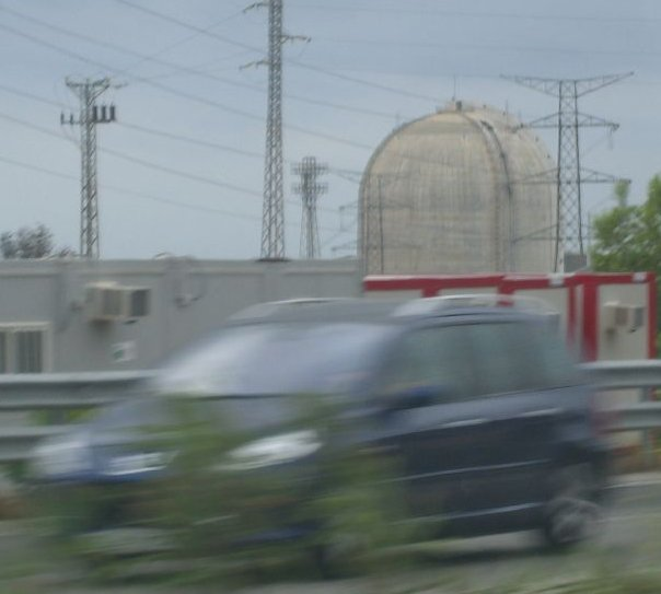 Central Nuclear de Vandellós. Tarragona, España (foto editada del original)